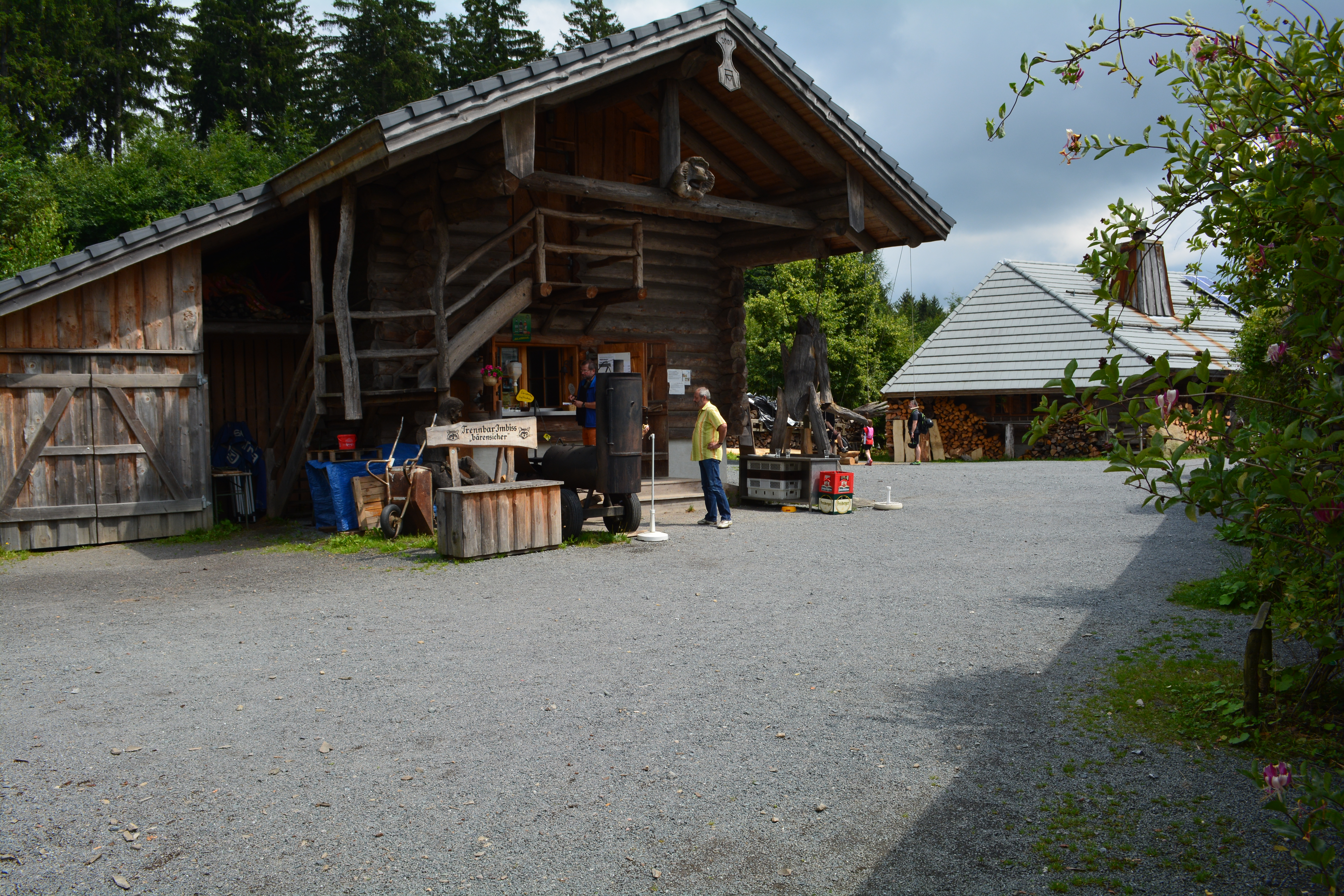 Blockhausen: Kettensägen-Schnitzen, Kiosk und darüber befindet sich das Heu-Hotel